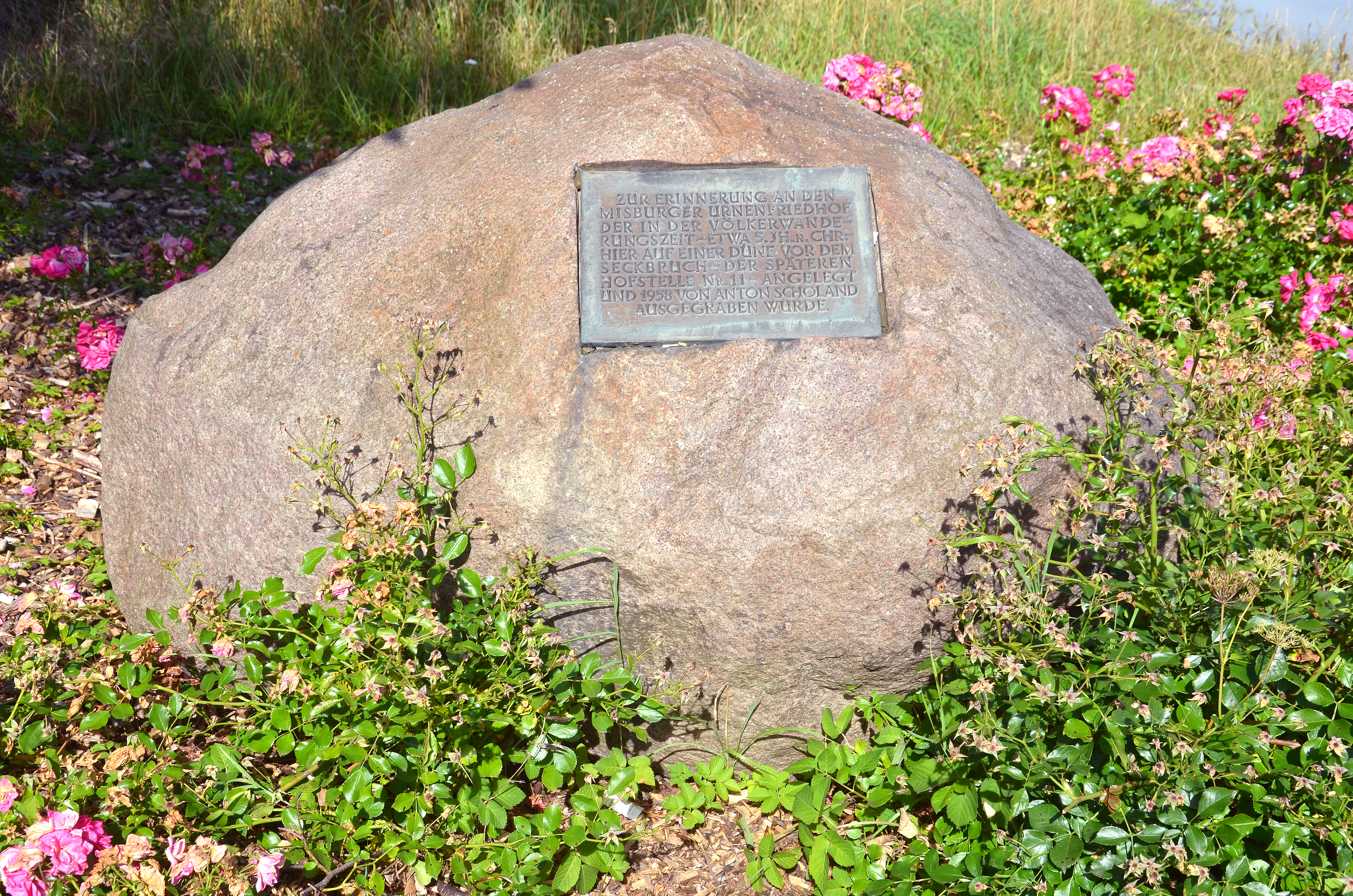 Findling an der Stelle des Misburger Urnenfriedhofs an der Anderter Straße in Hannover-Misburg. Die eingelassene Informationstafel mit dem Text „Zur Erinnerung an den Misburger Urnenfriedhof (,) der in der Völkerwanderungszeit - etwa 5. Jh. nach Chr. - hier auf einer Düne vor dem Seckbruch - der späteren Hofstelle Nr. 11 - angelegt und 1958 von Anton Scholand ausgegraben wurde.“ ...